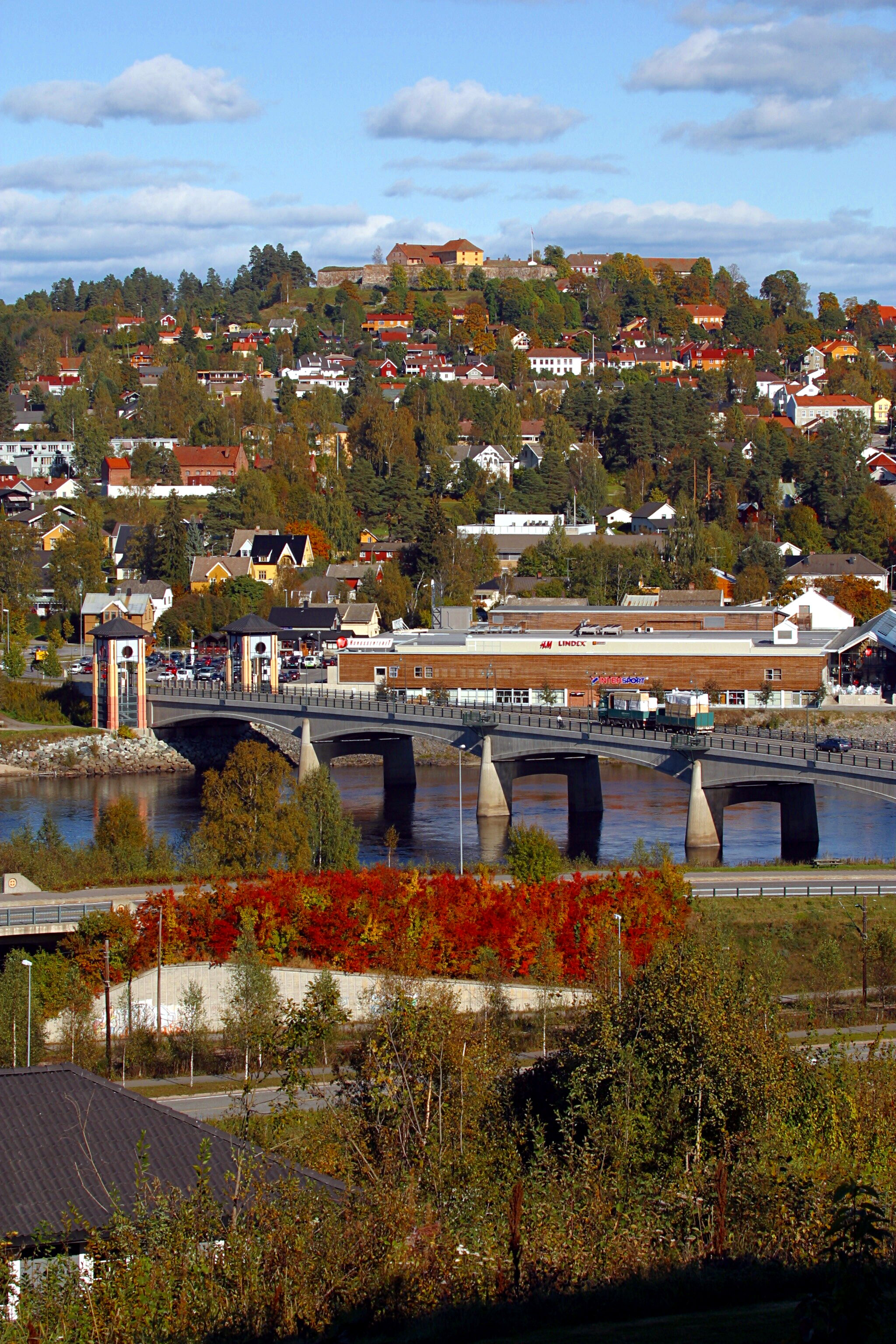 Nybrua, Kongssenteret og festningen